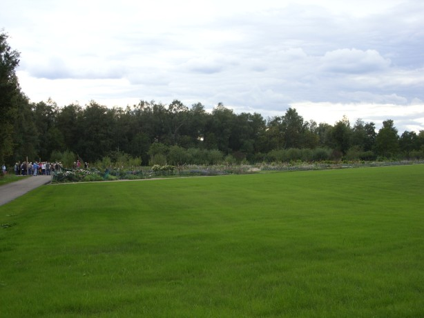 Landesgartenschau Norderstedt, Blütenfelder während der Bauphase (Feldpark)